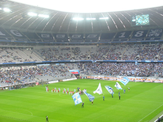 Muenchen, Allianz Arena